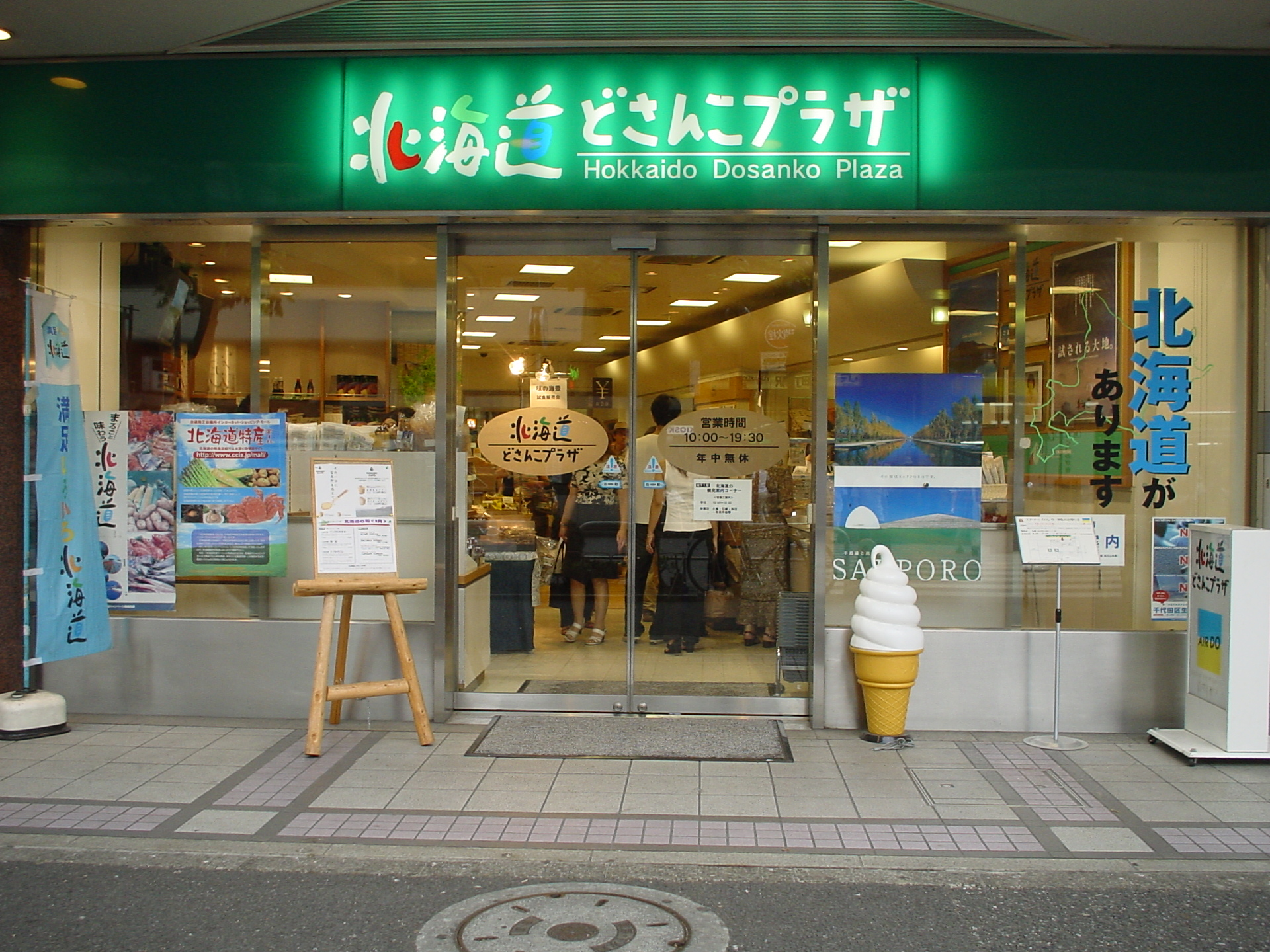 北海道どさんこプラザ外観（2004年8月）.